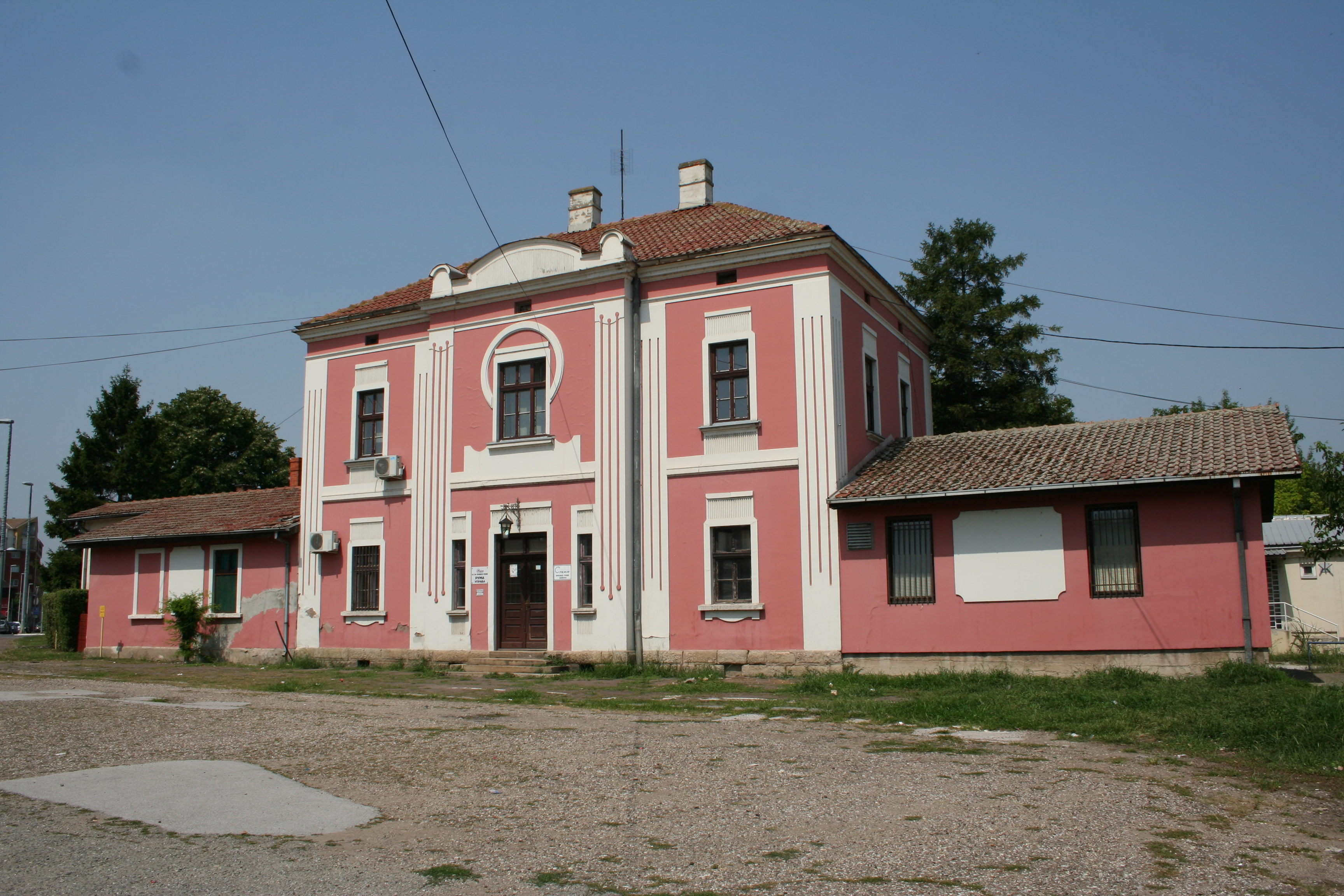 Železnička stanica Šabac